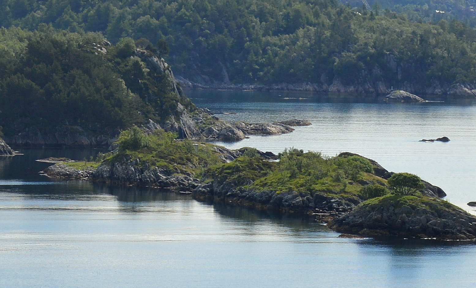 Insel Tyskholmen